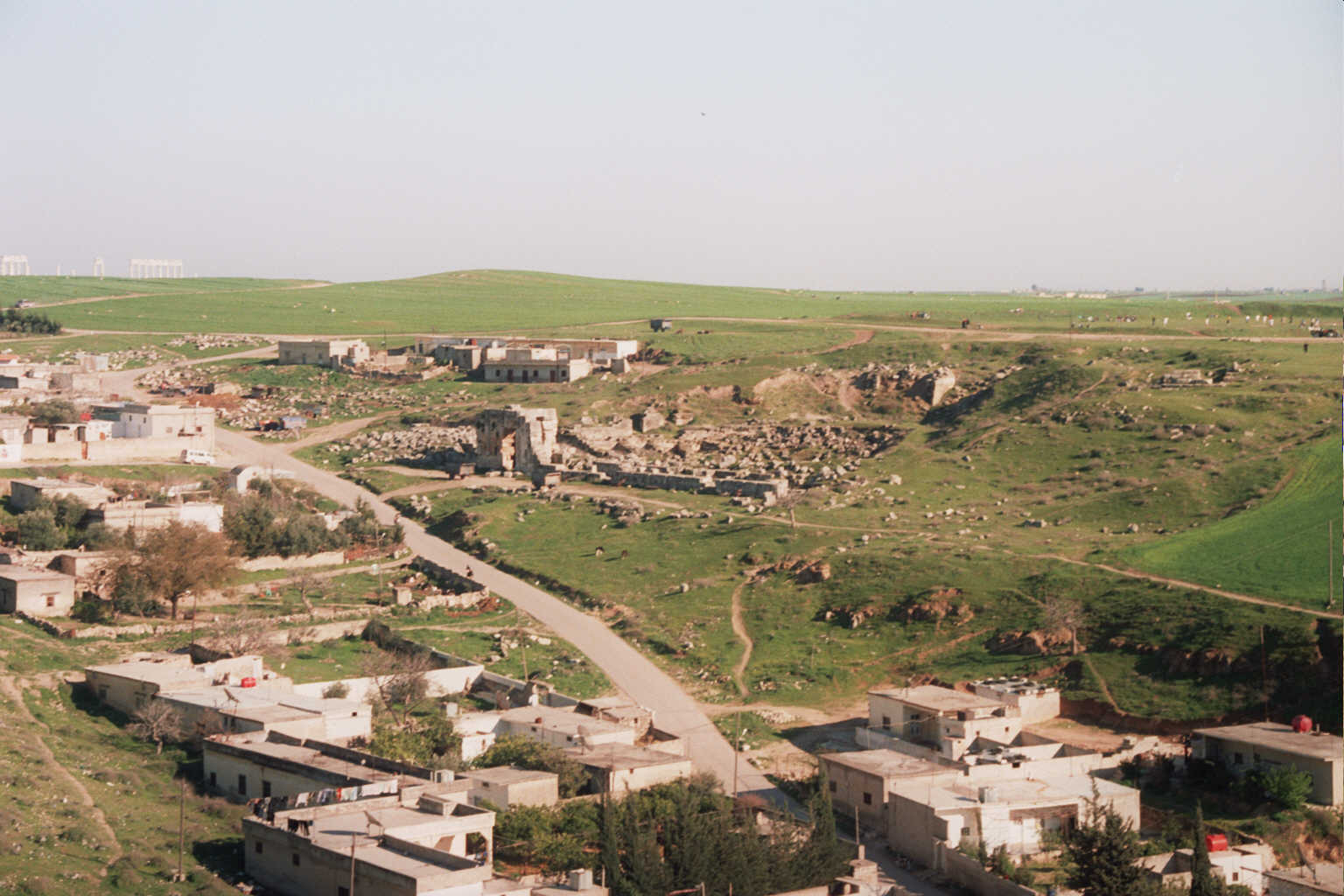 Apamea - Siria Antico teatro Romano nei pressi del villaggio moderno